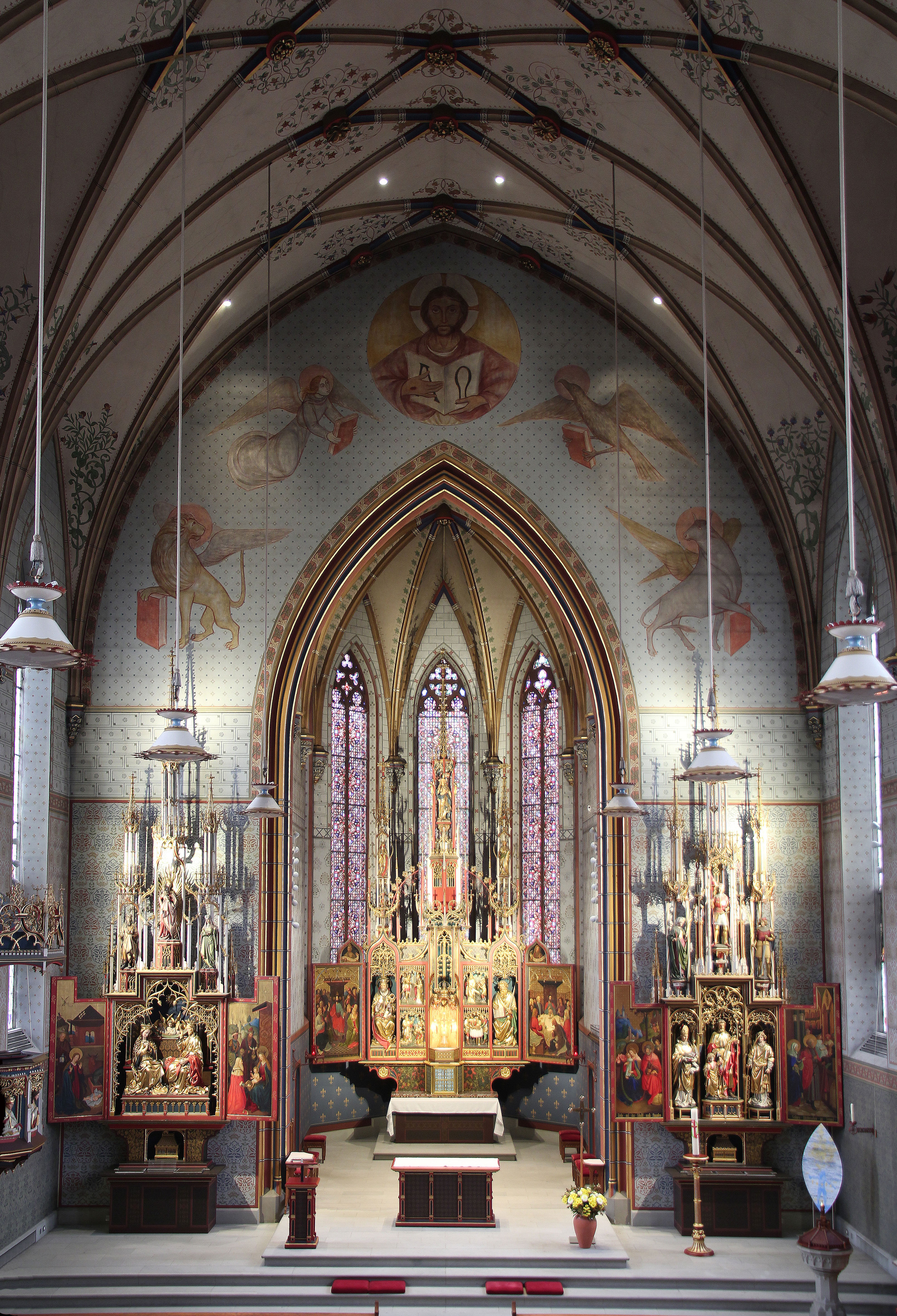 Römisch-katholische Pfarrkirche St. Peter und Paul Winterthur-Neuwiesen, Altarbereich